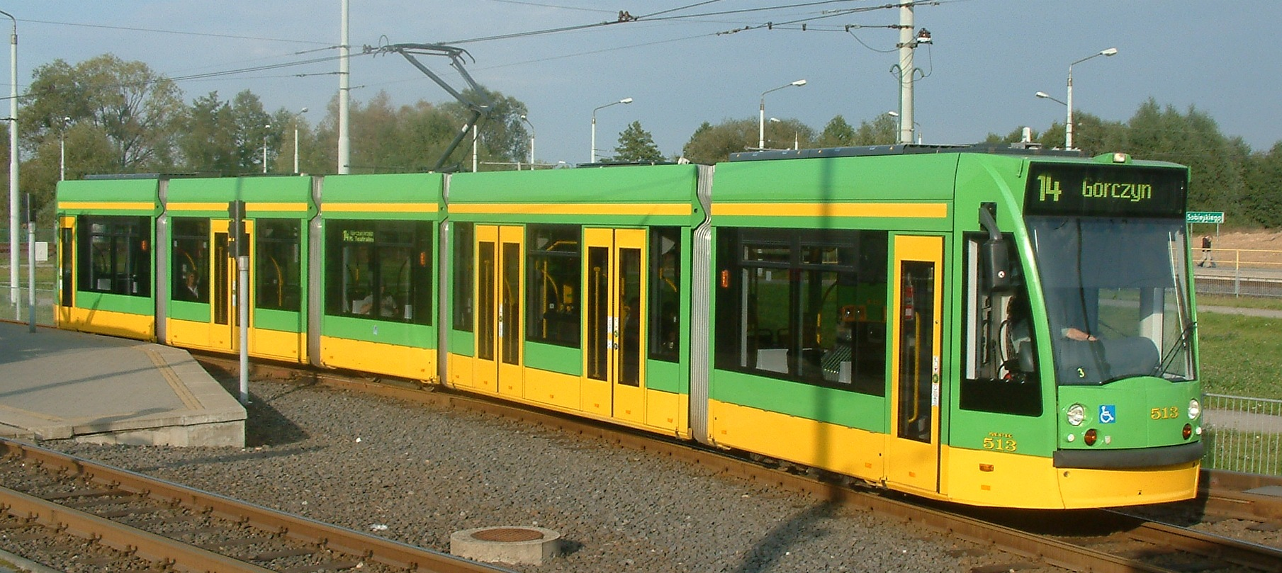 Siemens Combino on PST line in Poznań